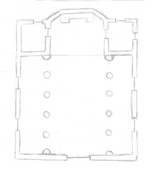 Plan supposé de l'état de 1771.